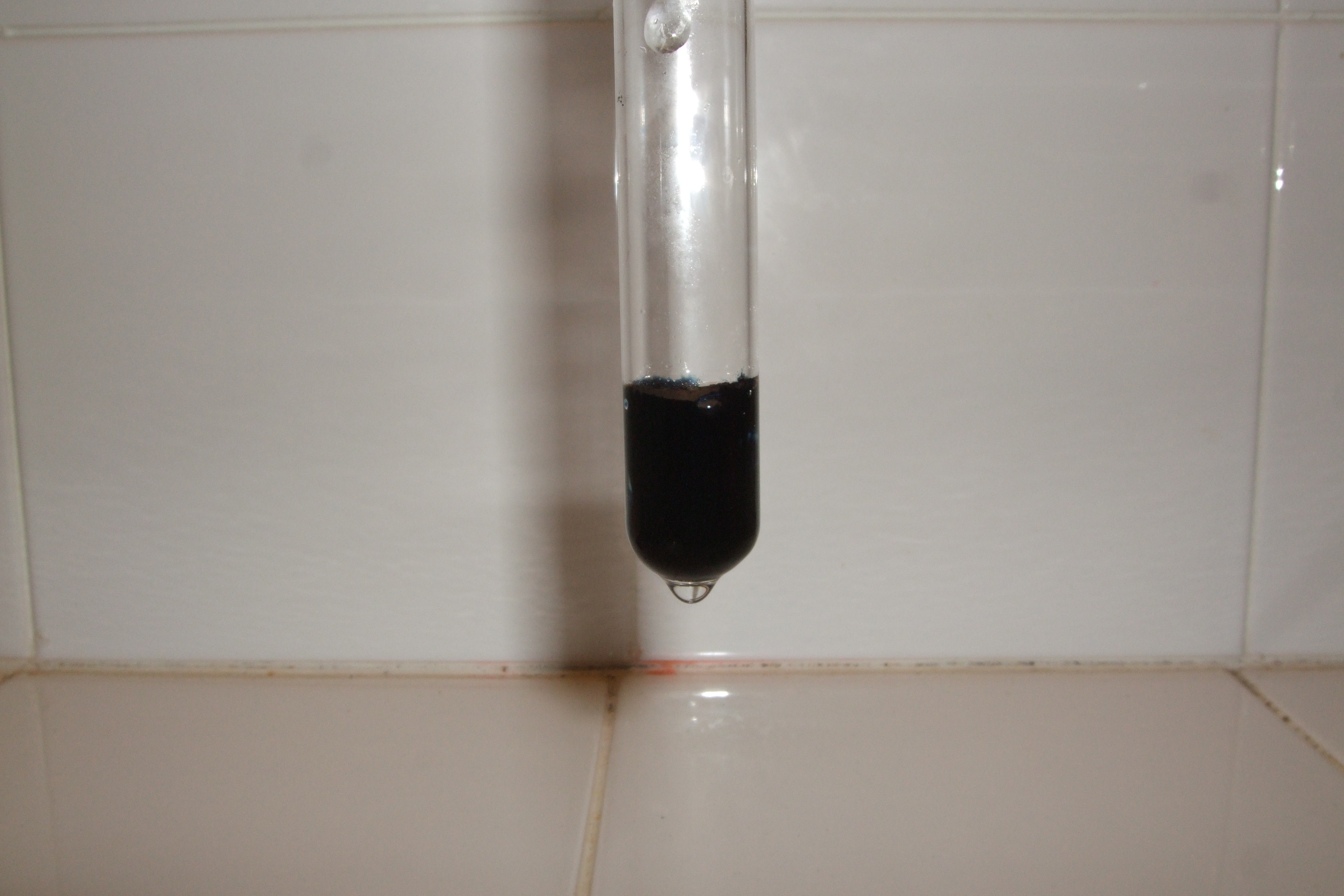 Natrium in flüssigem Ammoniak (Bildung von Natriumelektrid)